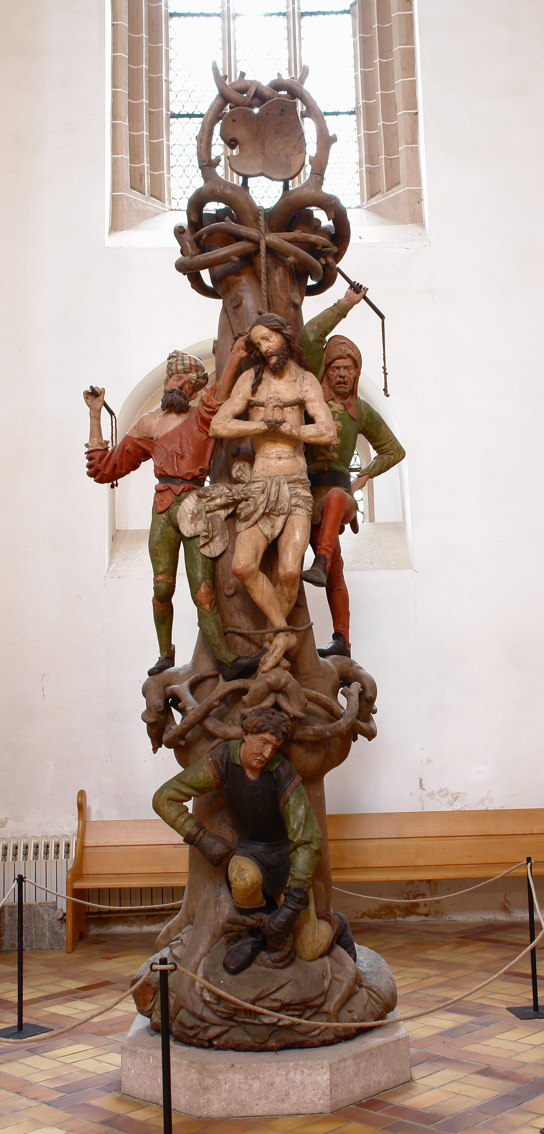 Geißelsäule mehr Infos unter